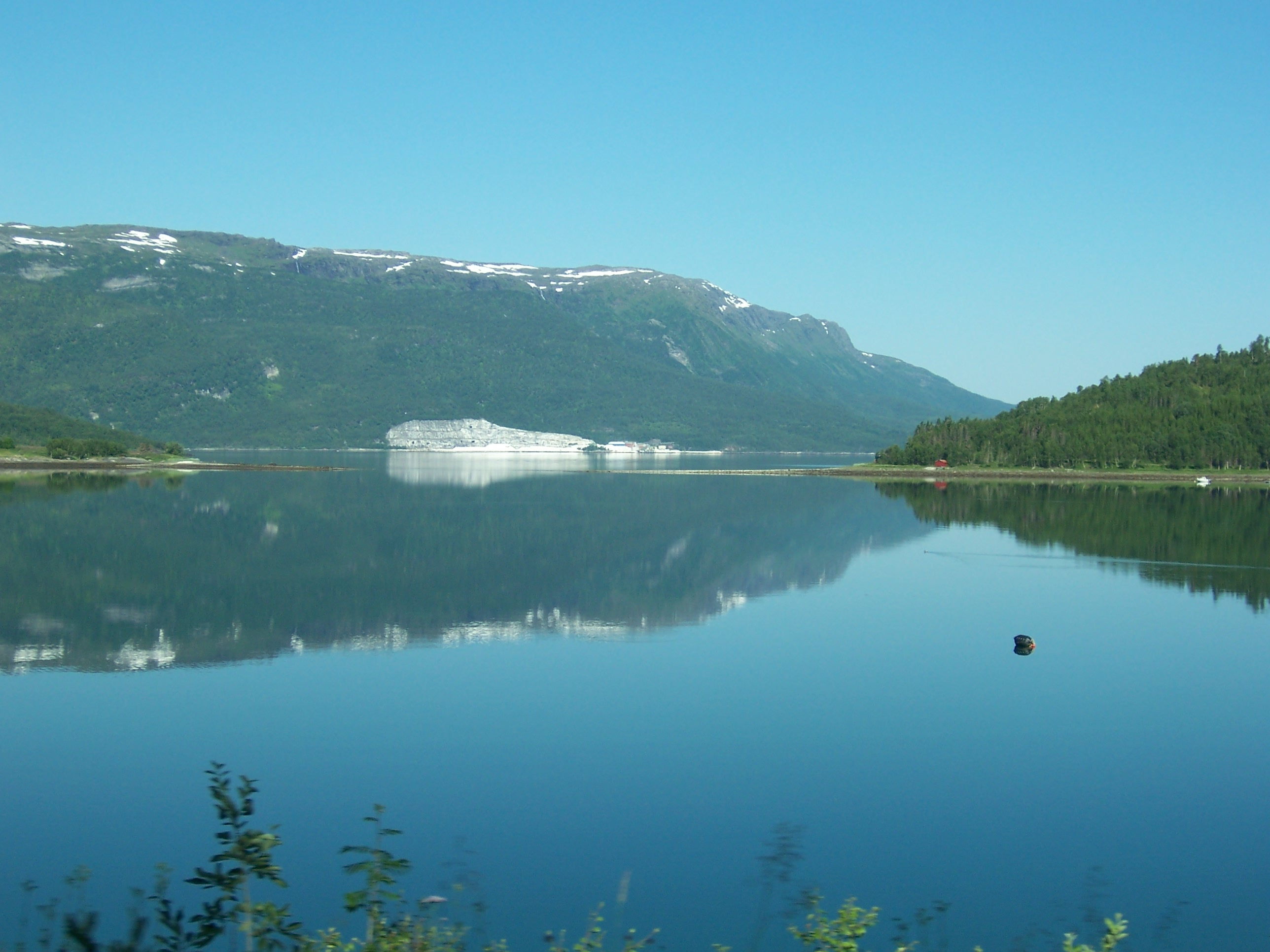 Sørfolda fjord in Sørfold, Nordland, Norway